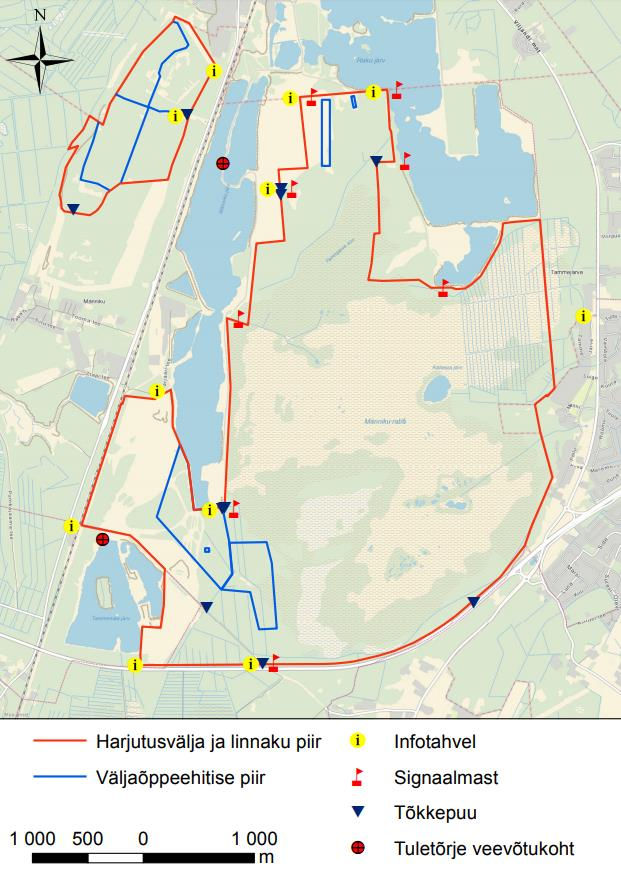 Joonisel on näha Männiku harjutusvälja piirid ning tähtsad kohad.